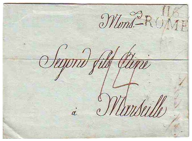 Почтовый конверт, отправленный из Рима в Милан со штемпелем линейного вида времён французской оккупации (1813)